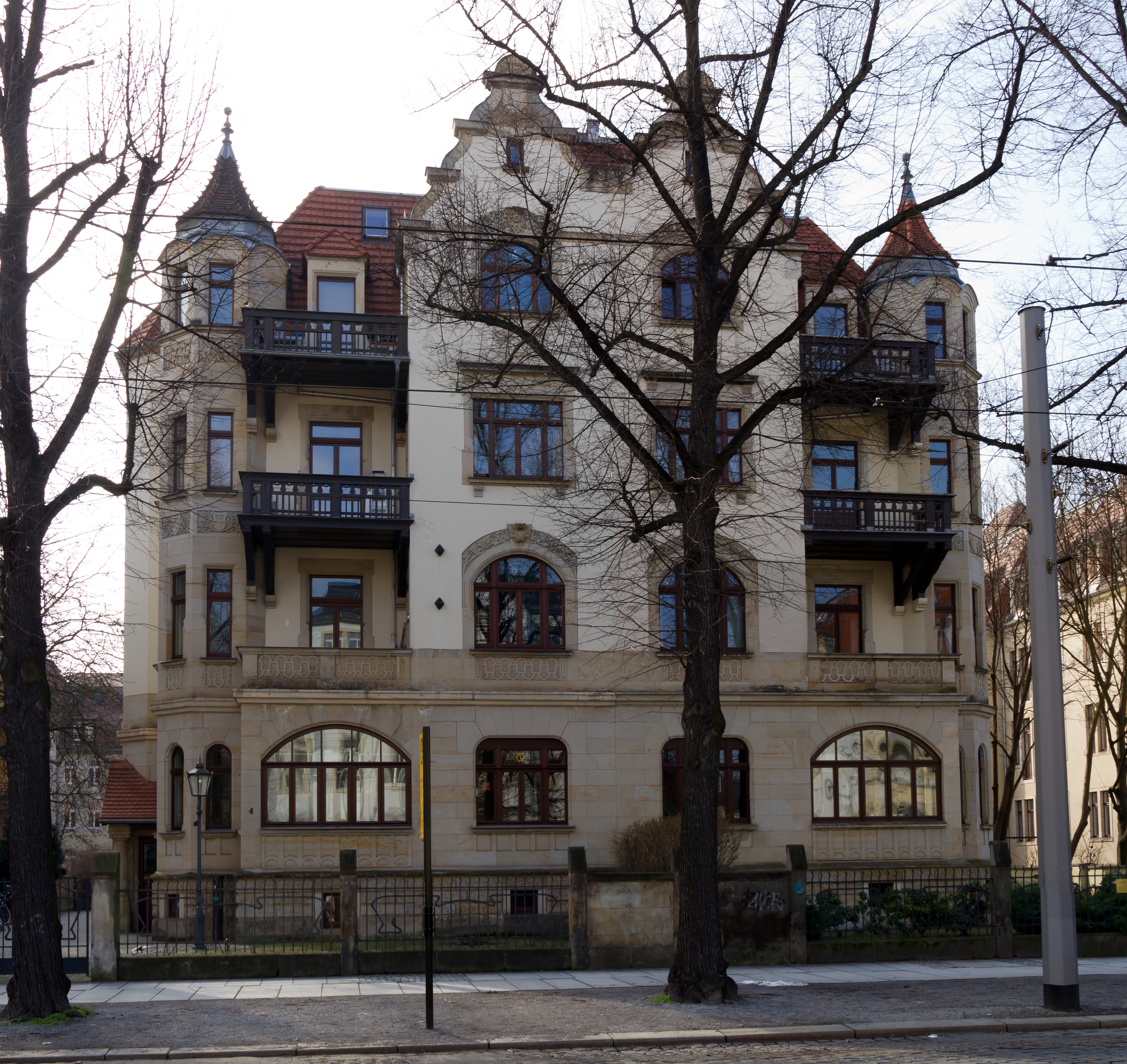 Dopplemietshaus Borsbergstraße 2 und 4, Dresden